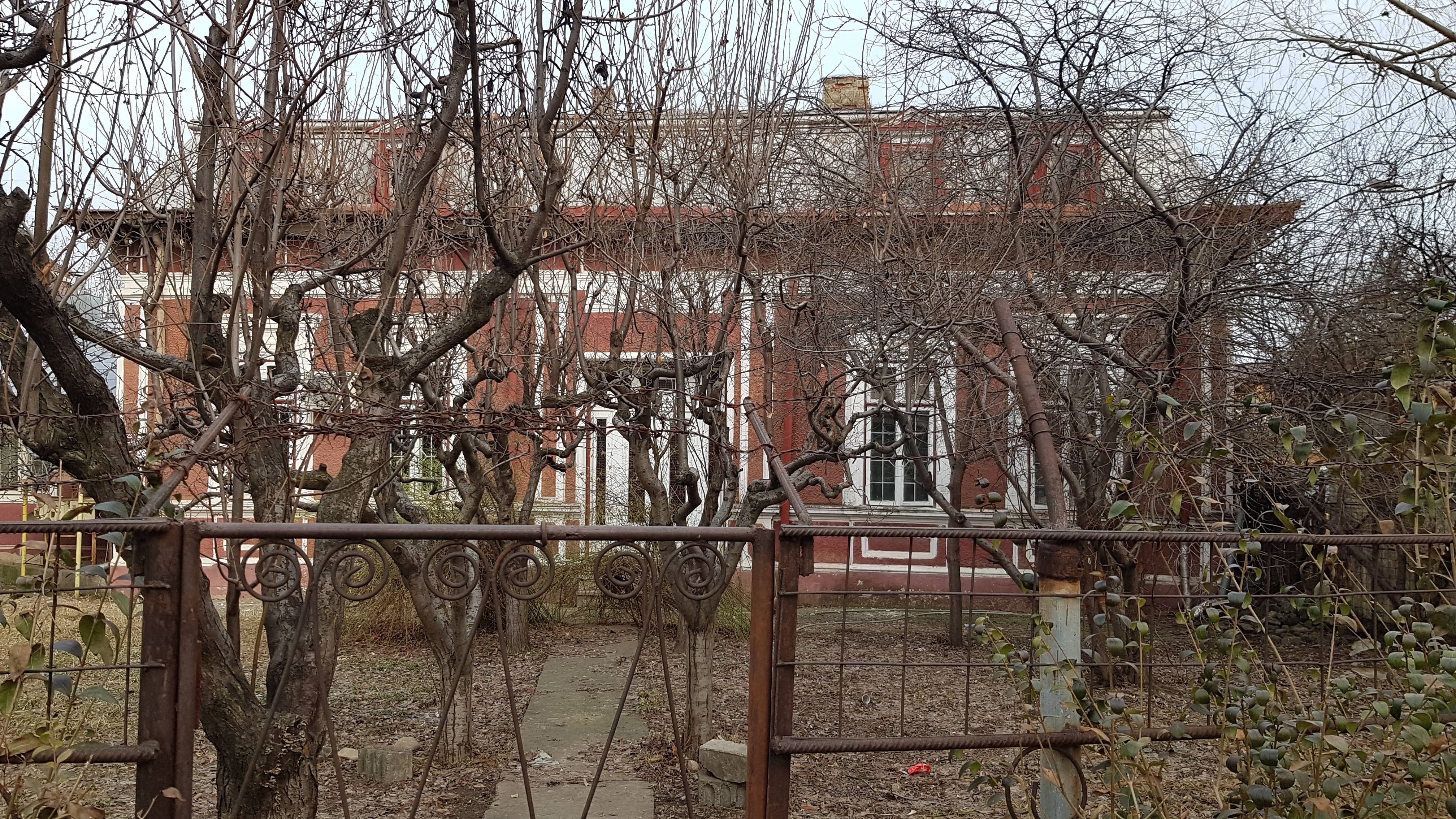 Casa I. Brătilă